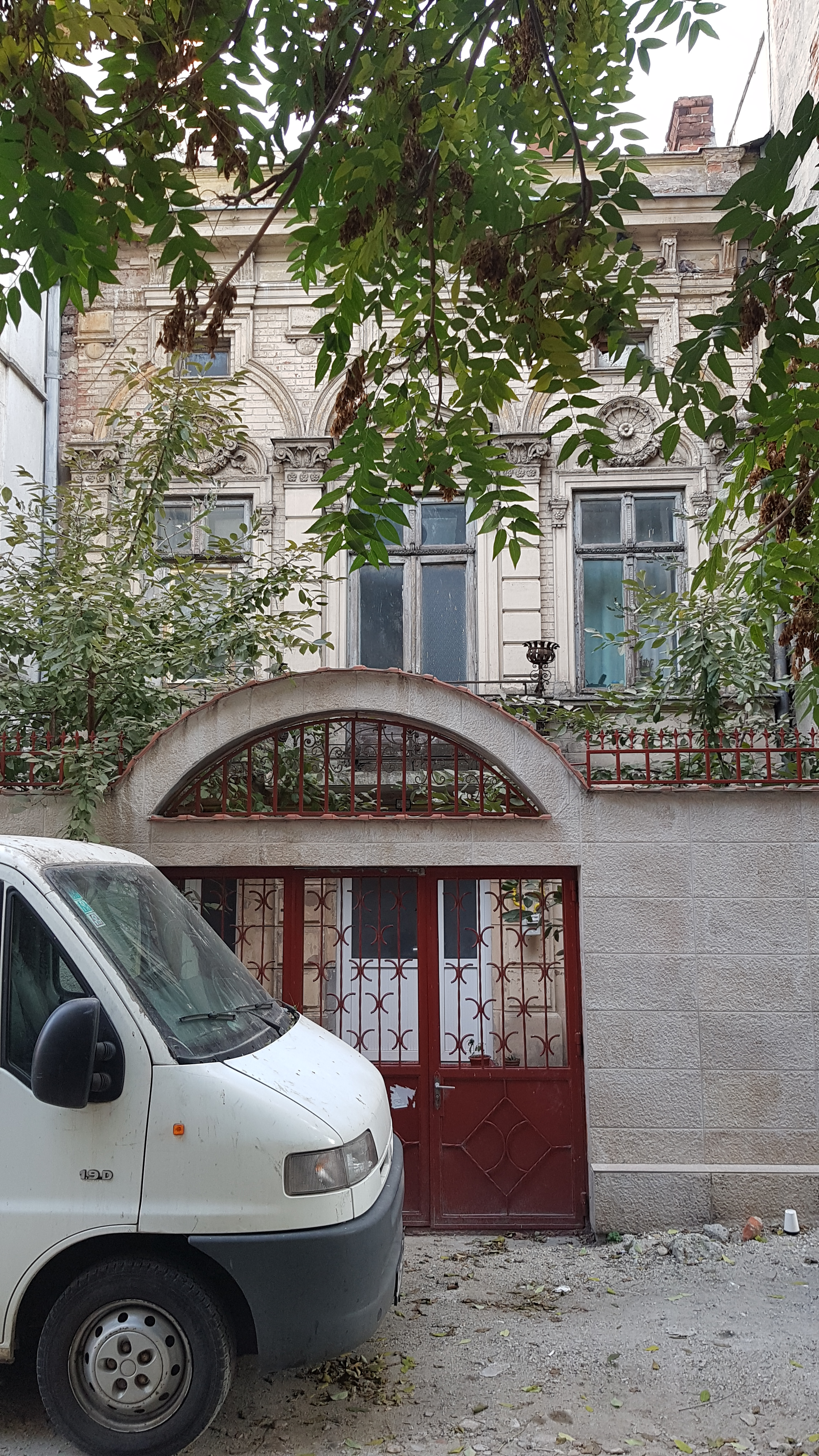 Casă, monument istoric